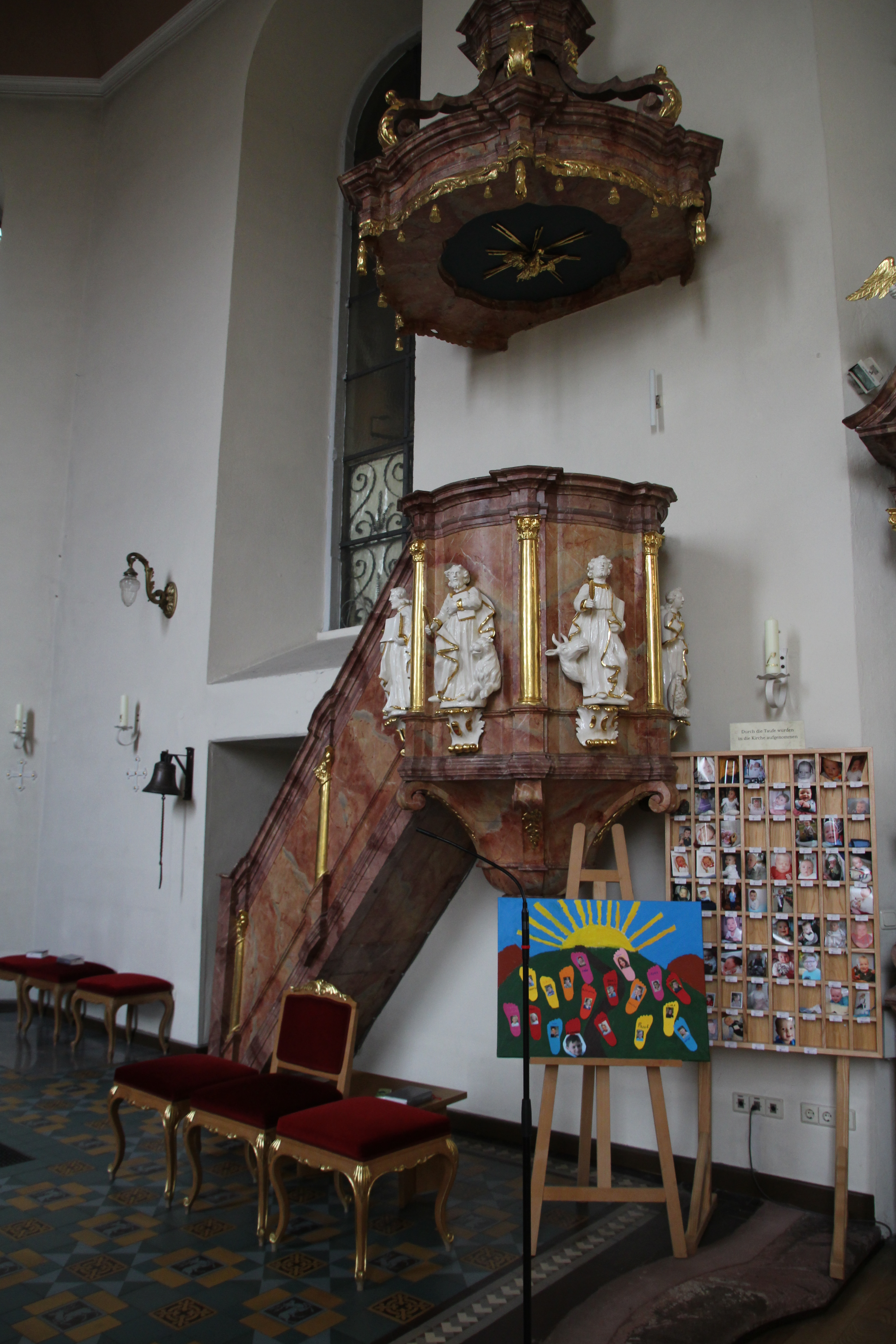 Kirch Heldenberg